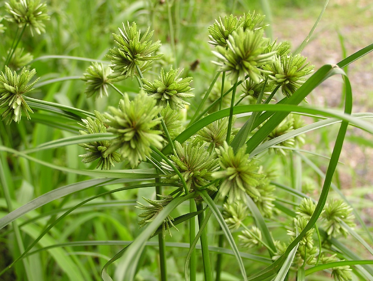 Cyperus eragrostis neben einem Reisfeld in Shiga-ken (Japan).